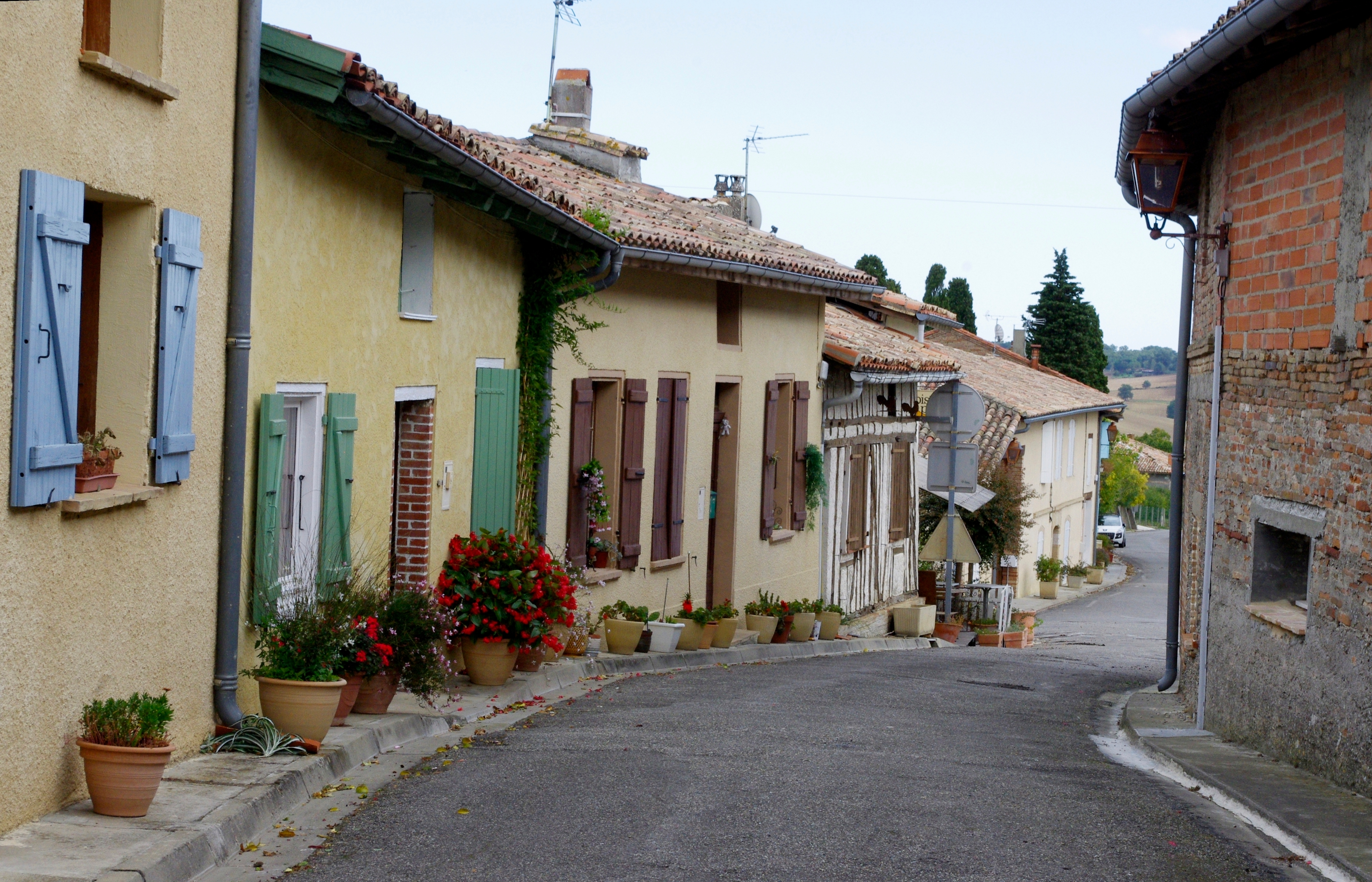 Brignemont, Haute Garonne, France.